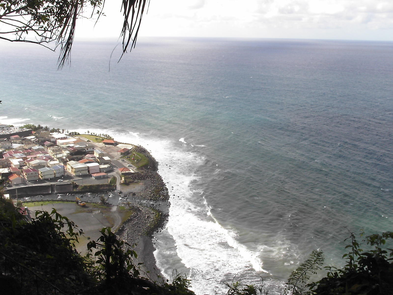 Embouchure, Grand'Rivière en Martinique